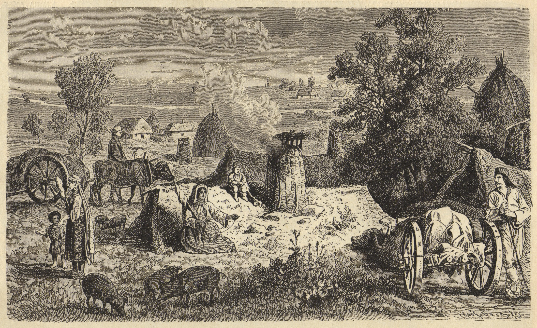 Село Василовци в средата на 19 век (1864). Гравюра от Феликс Каниц, "Дунавска България и Балканът", Том първи, Издание "Българска историческа библиотека", София, 1932, приложение №9.